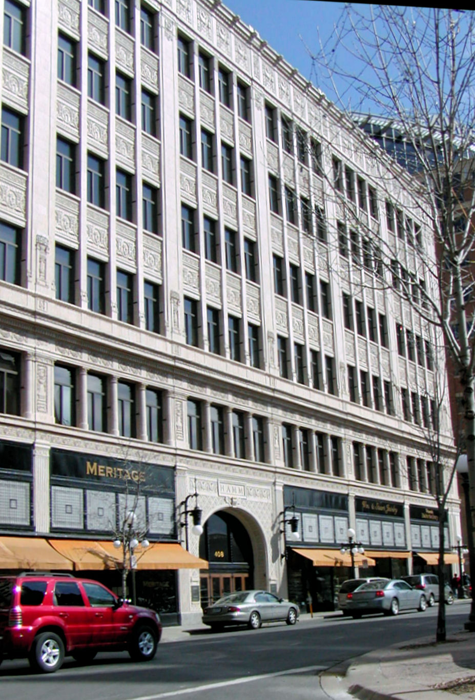 Hamm Bldg., 408 St. Peter Street, Saint Paul